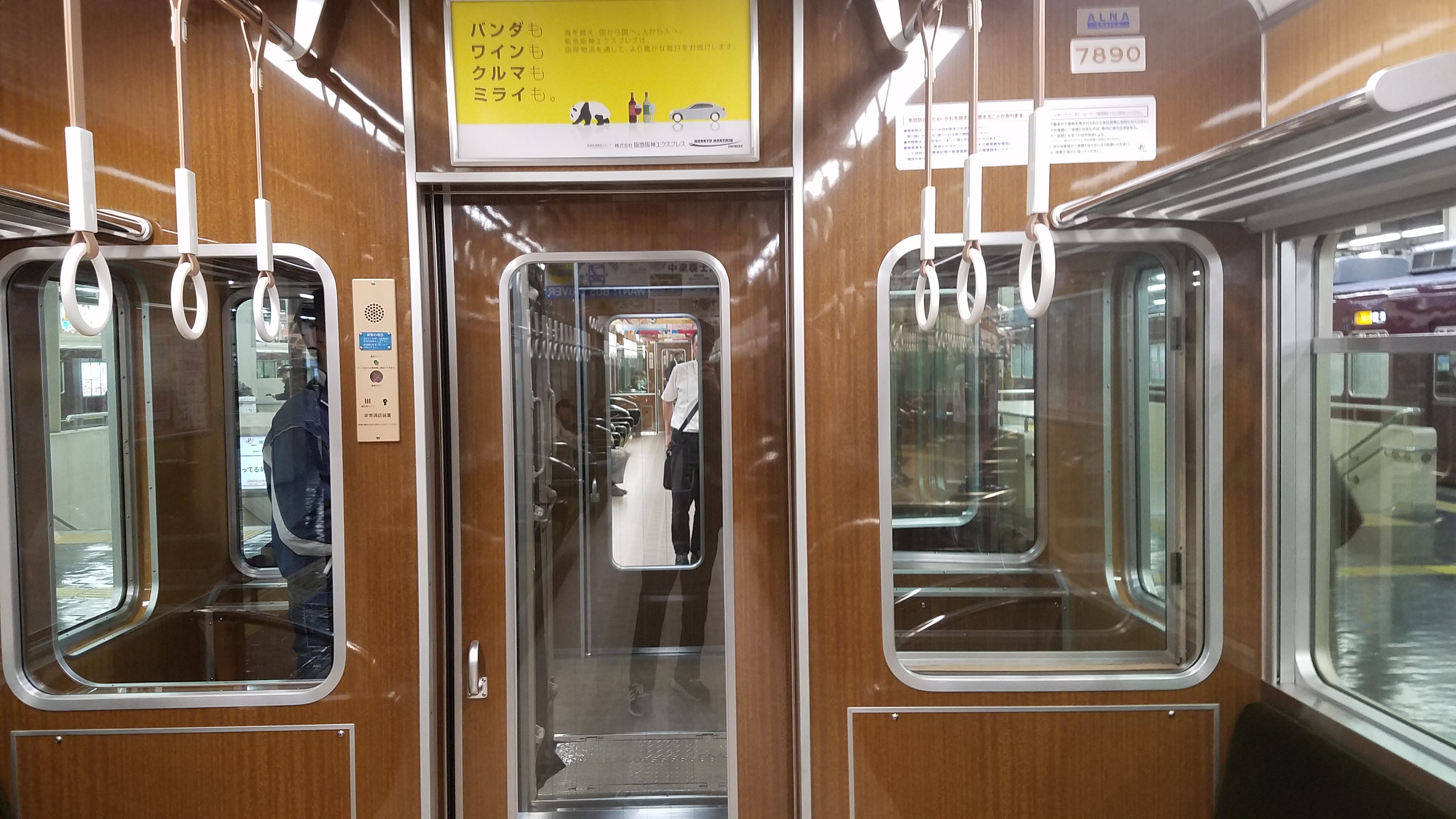 元7310号車